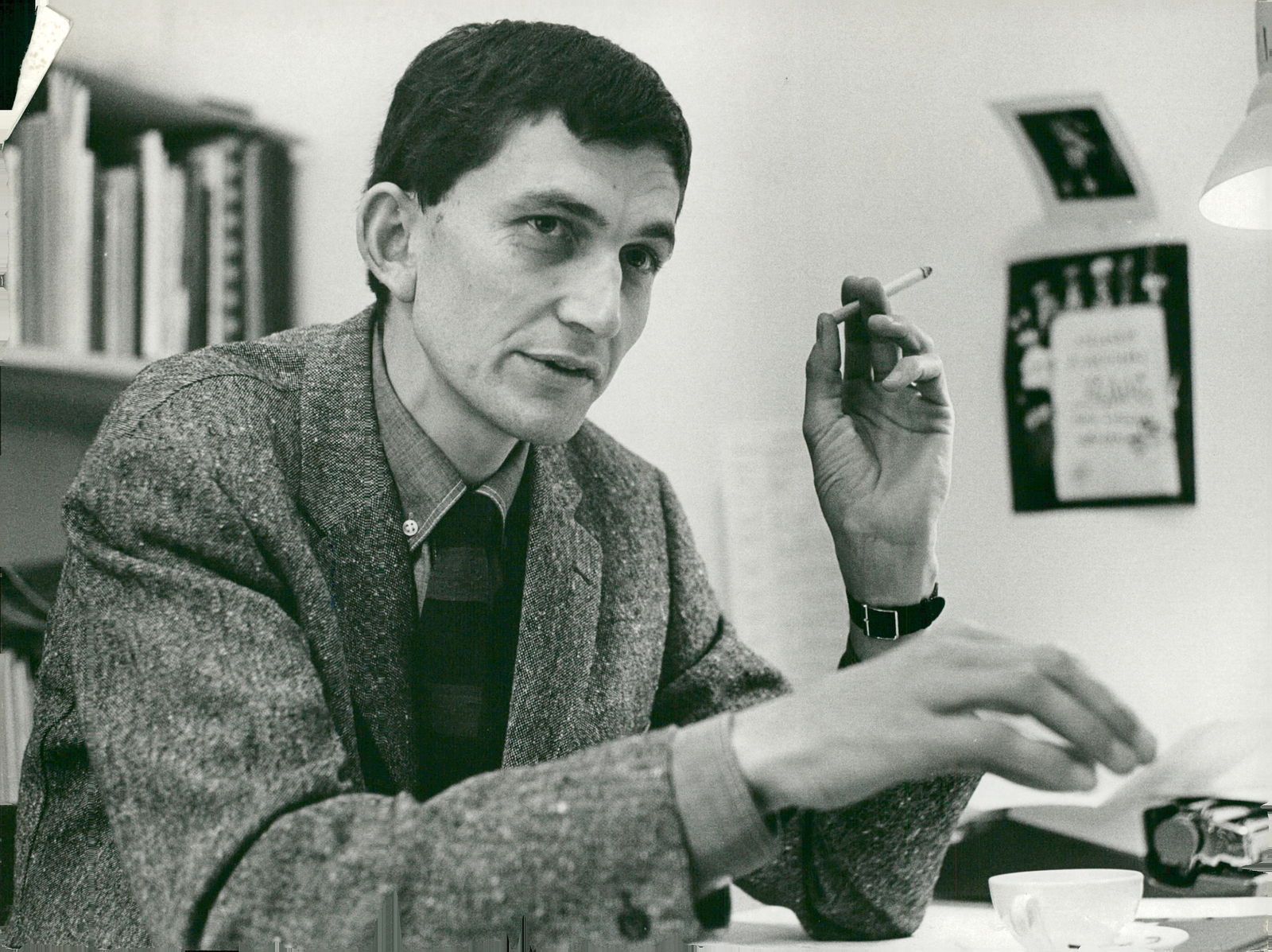 Fotografi av Michael Meschke, infört i Svenska Dagbladet 1965-09-28 s. 23.